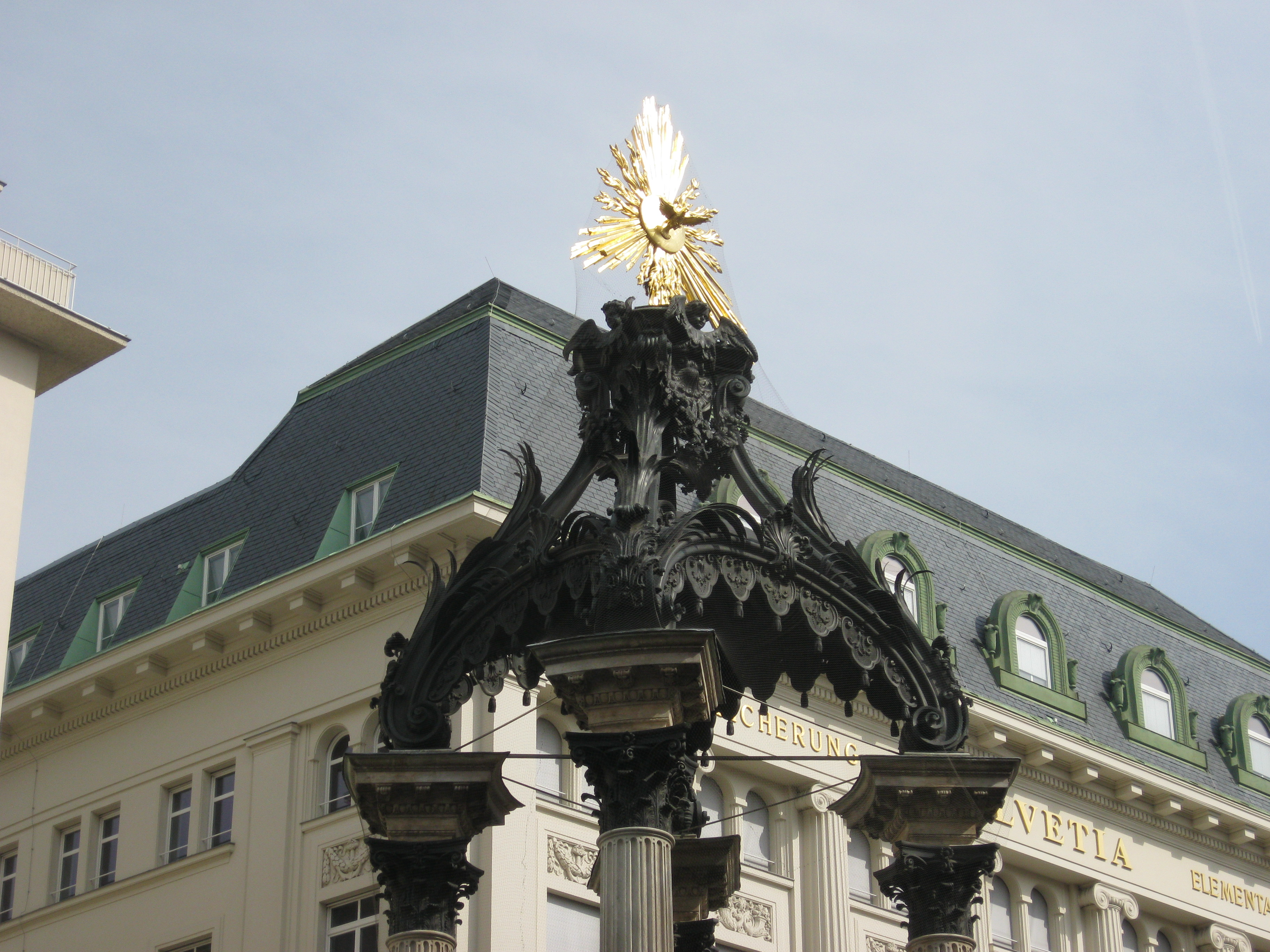 Der Vermählungsbrunnen am Hohen Markt in Wien, Innere Stadt Object location48° 12′ 39.16″ N, 16° 22′ 22.72″ E